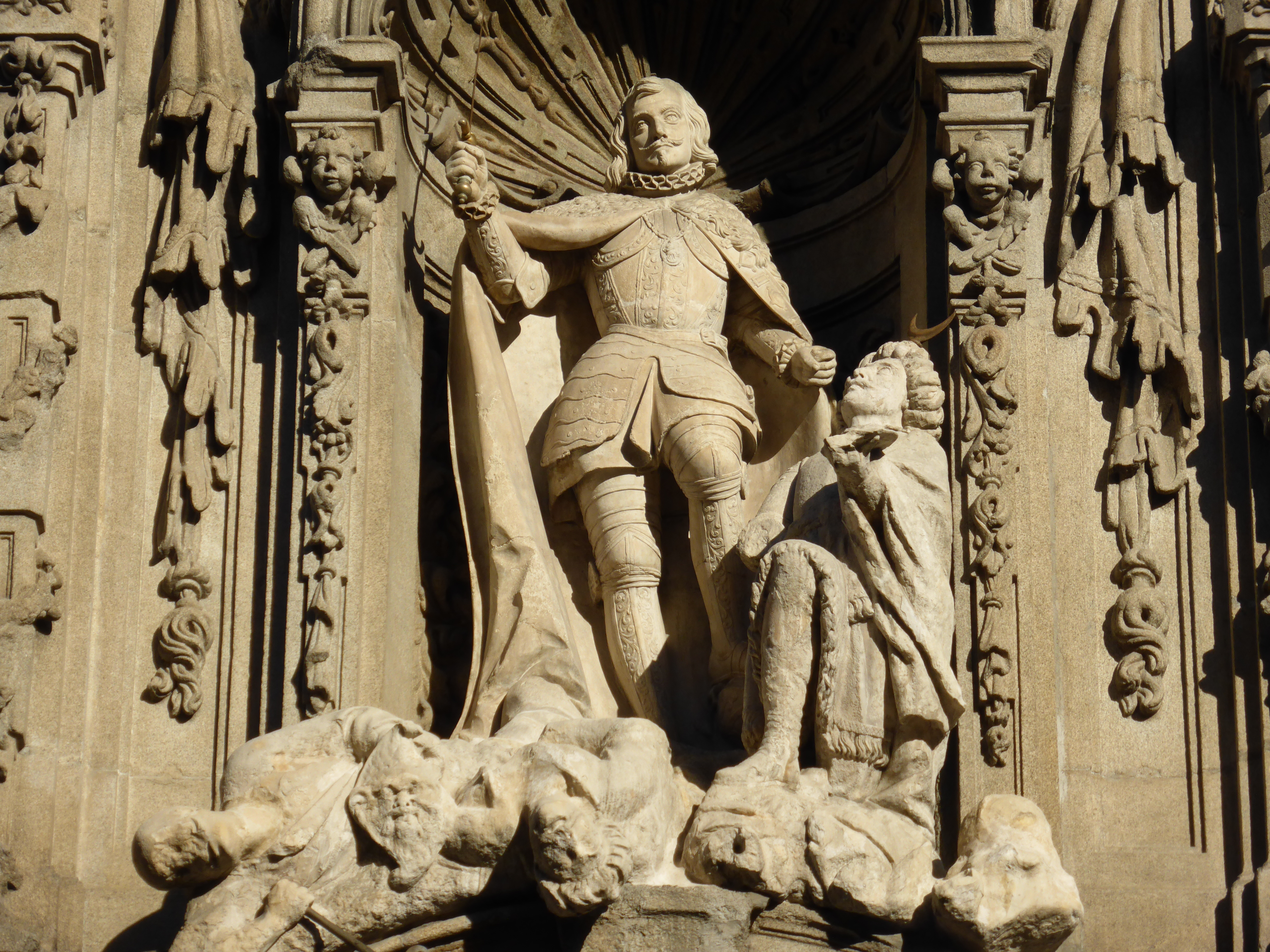 El Real Hospicio del Ave María y San Fernando es una construcción del siglo XVIII, obra de Pedro de Ribera, que destaca por su fachada barroca. En la fotografía vemos la escultura de San Fernando, situada en la portada principal. El inmueble actualmente es sede del Museo de Historia de Madrid (antes llamado Museo Municipal de Madrid). Se encuentra en la calle Fuencarral, número 78.